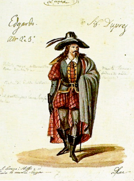 Figurino per il personaggio di Edgardo nella Lucia di Lammermoor